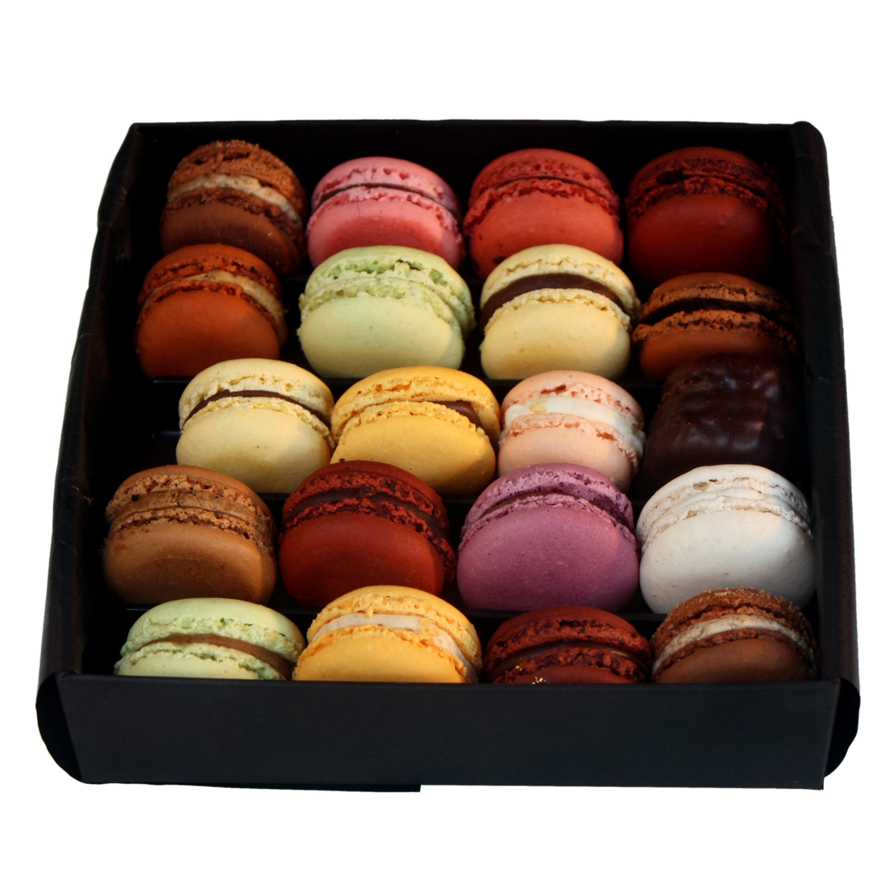 Macarons exposé en vitrine d'un magasin Pierre Marcolini.